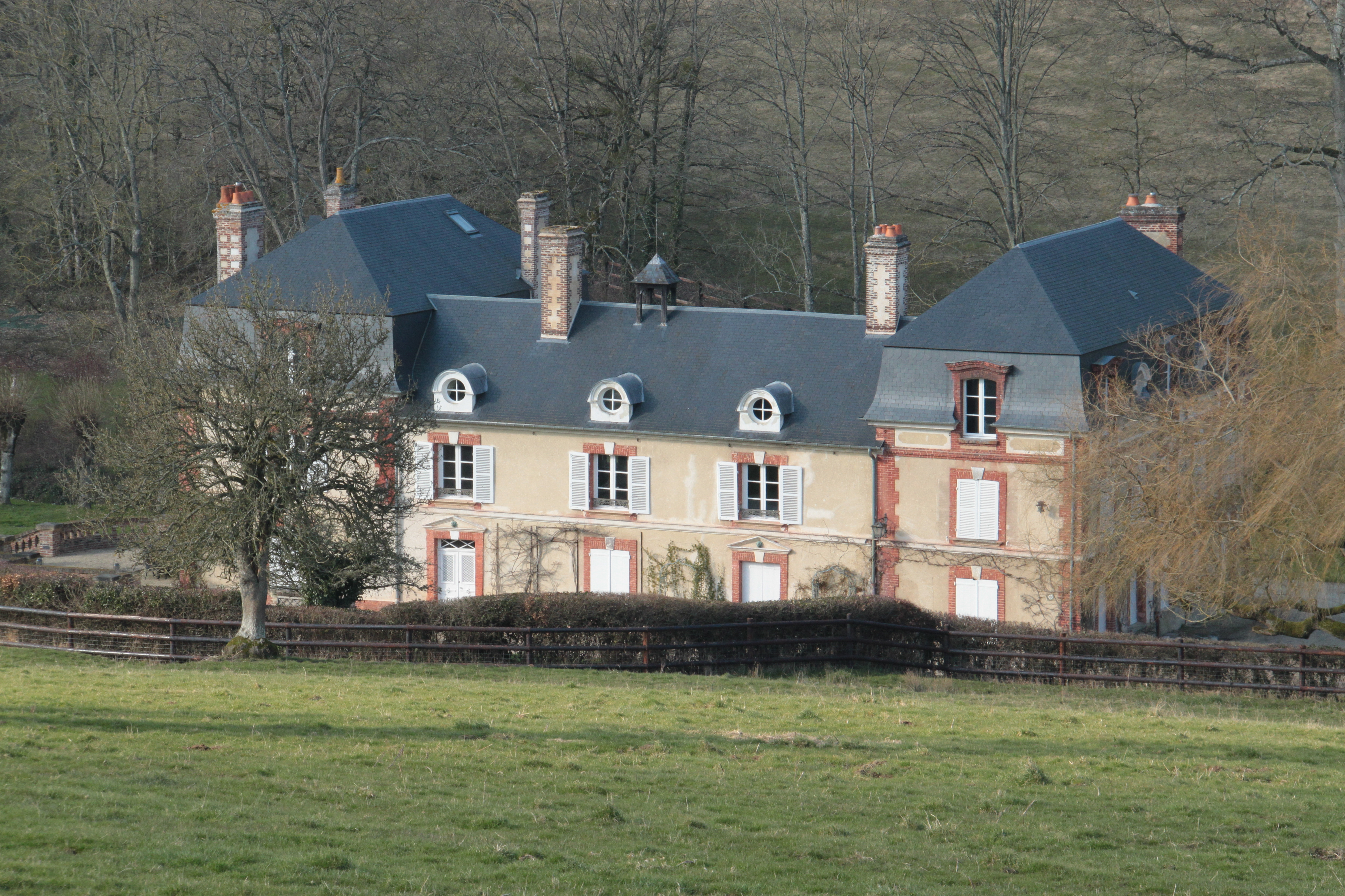 manoir du Mesnil-Germain (Calvados), France ; XVIIe siècle.